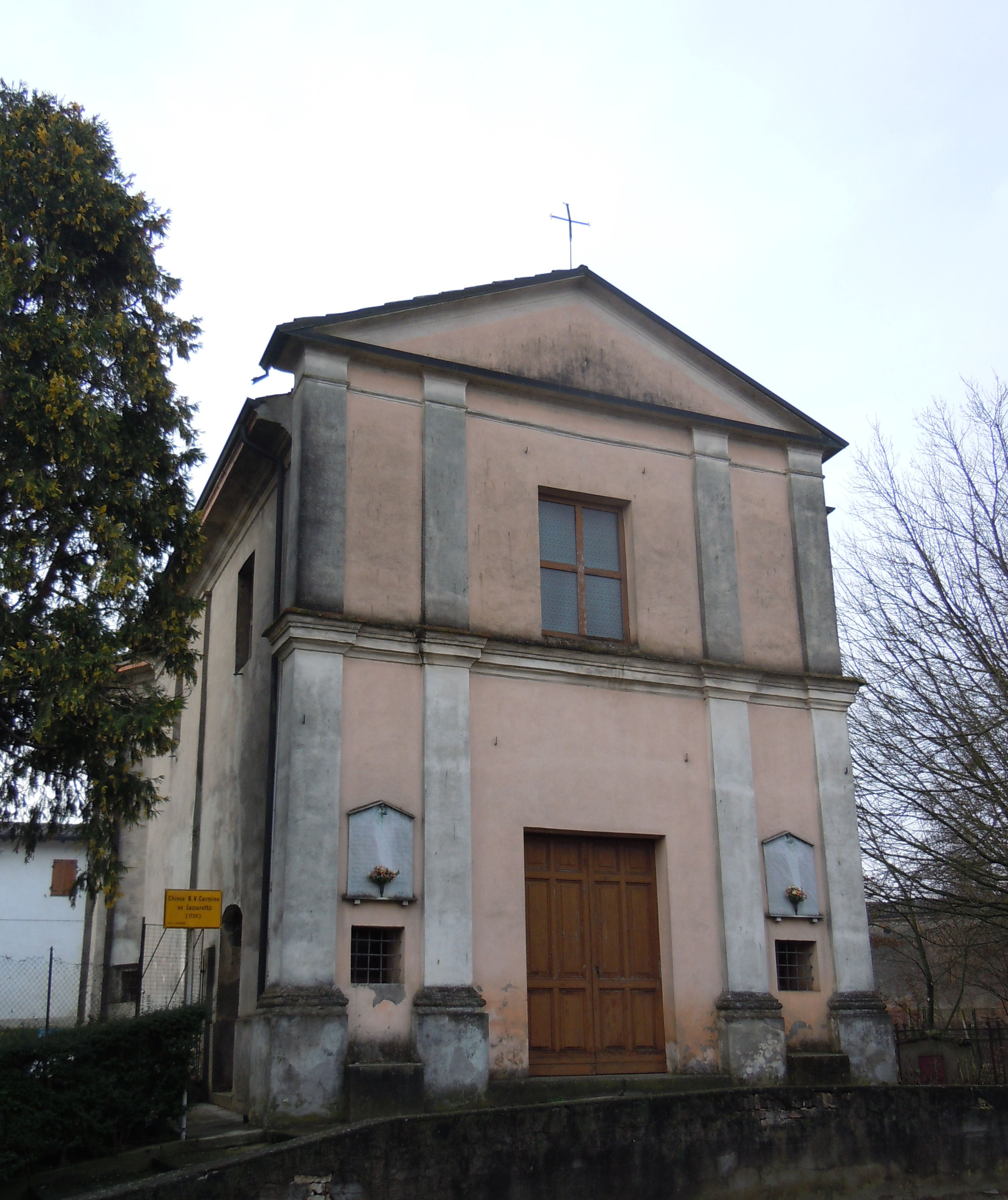 Isola Dovarese, chiesa della B.V. del Carmine.